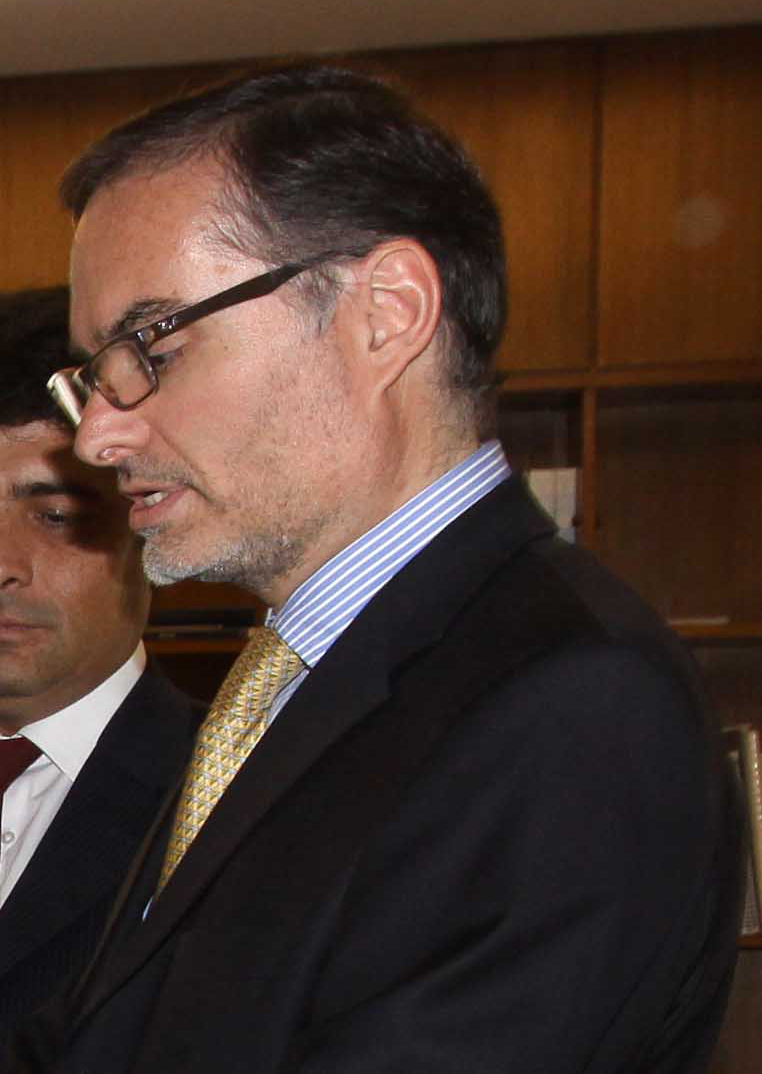 Evelyn Matthei, junto a la superintendenta de Seguridad Social, María José Zaldívar, entregaron antecedentes sobre licencias médicas al director del Servicio de Impuestos Internos (SII), Julio Pereira.